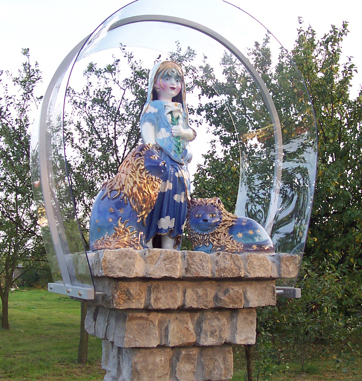 Kaplicza Świętej Eufemii we wsi Eufeminów koło Łodzi